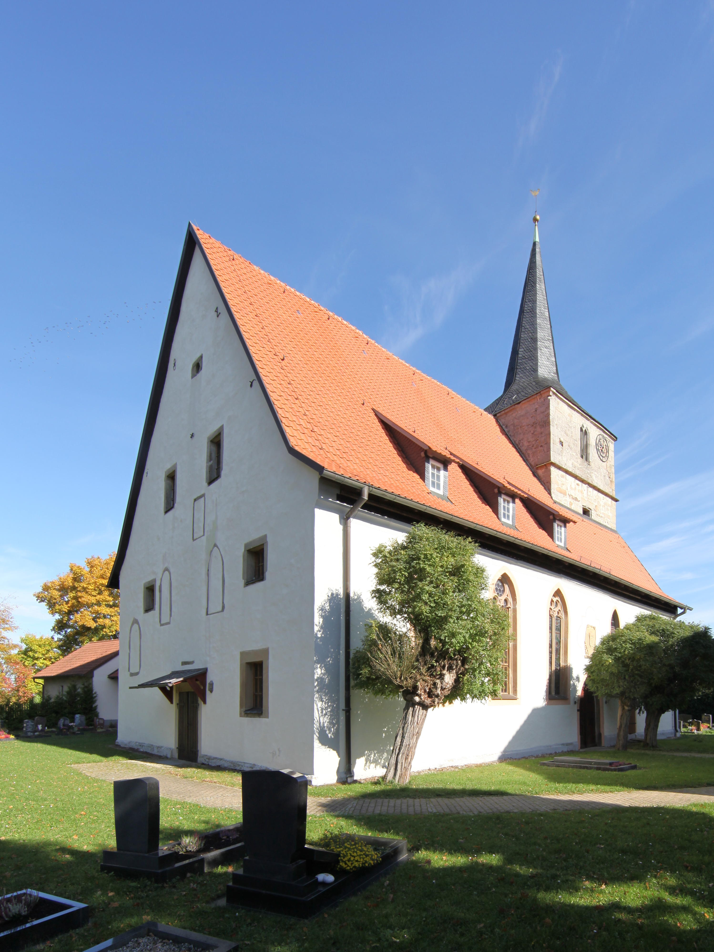 Rieth-Ev-Kirche